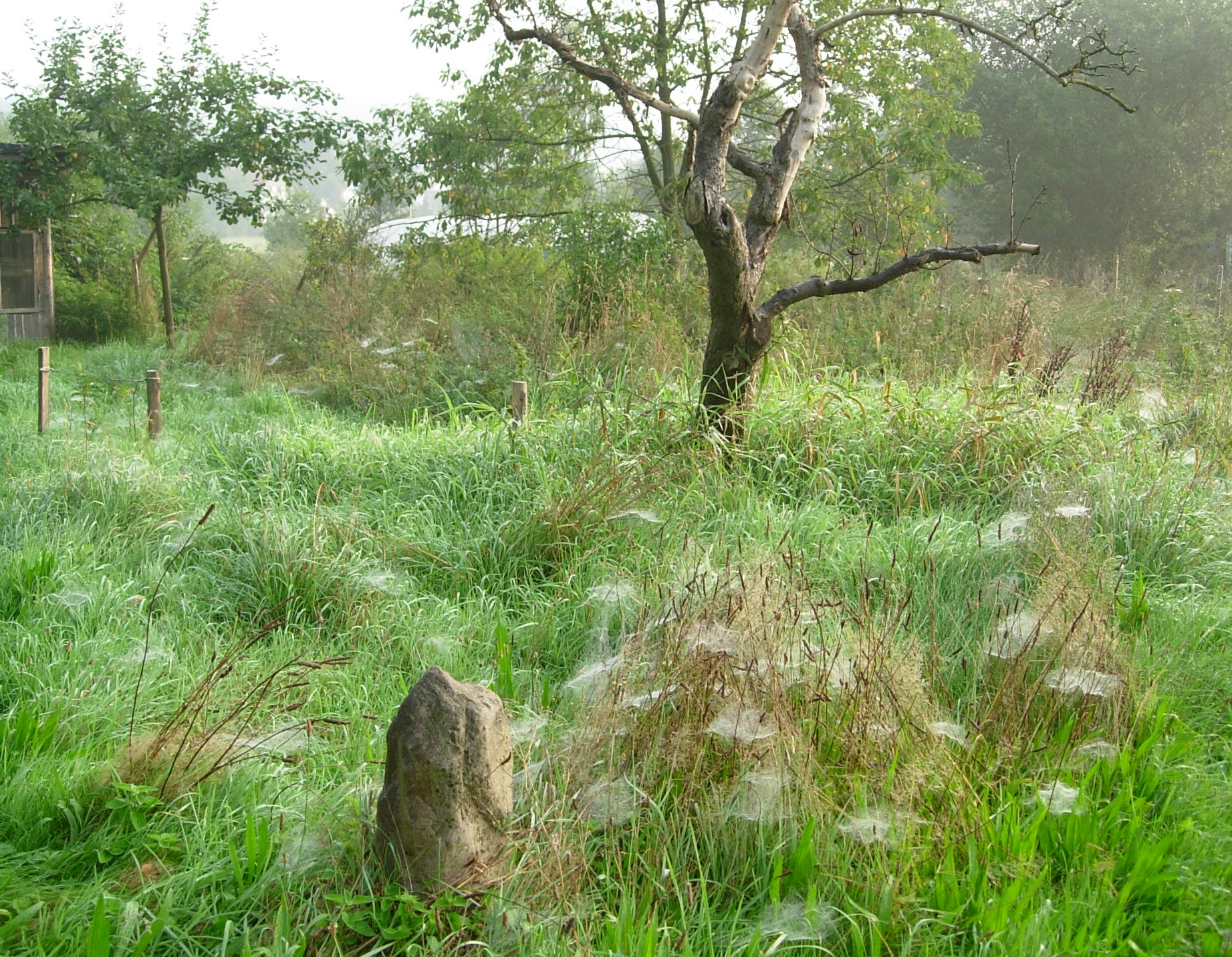 Altweibersommer, aufgenommen in Niedersachsen im September 2006